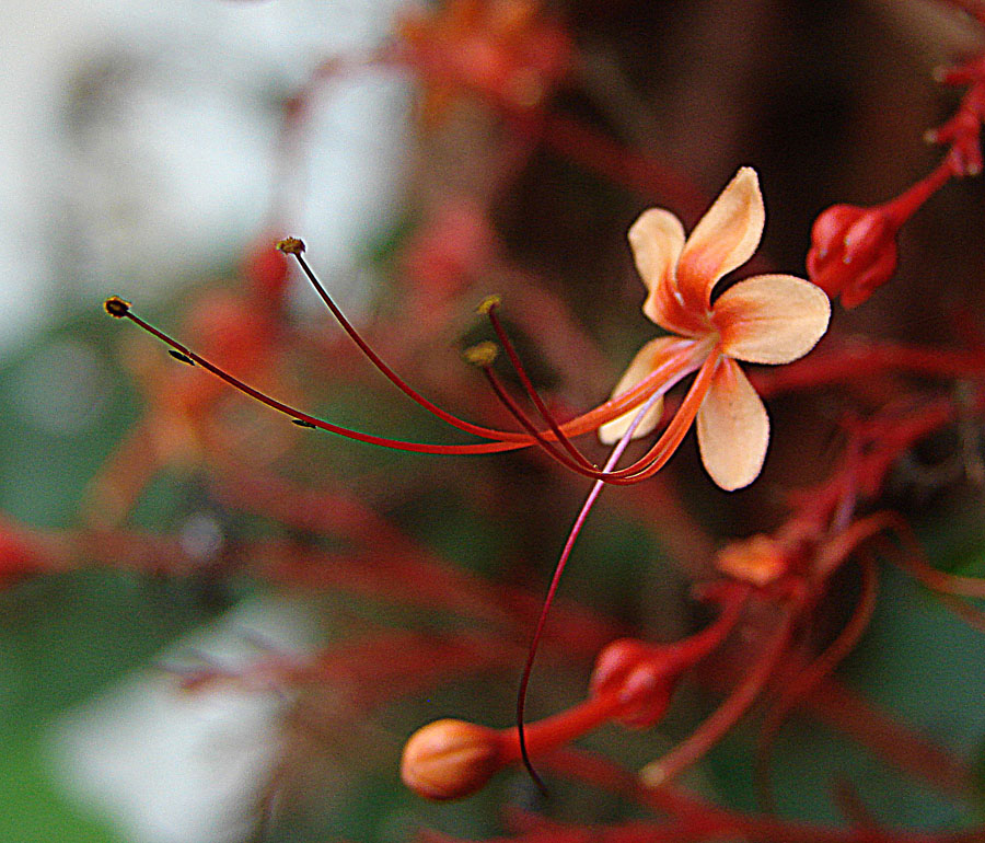 Clerodendrum paniculatum